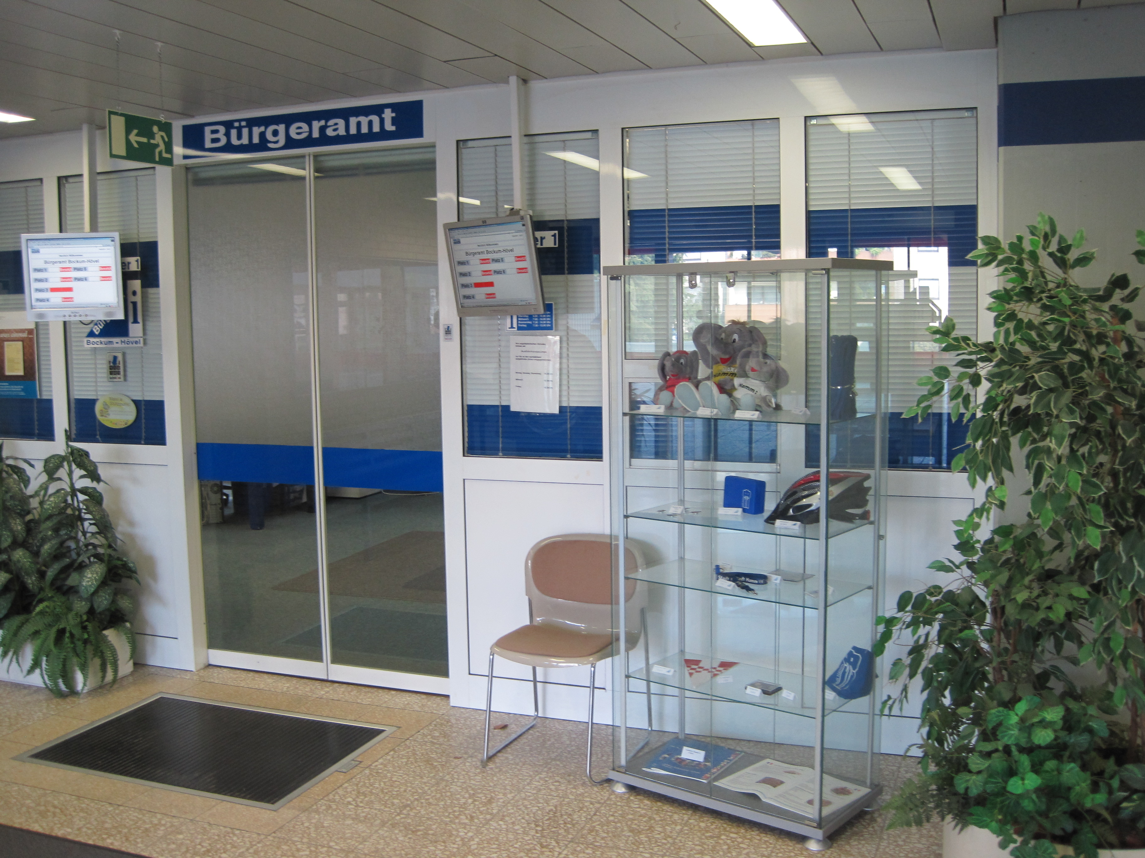 Das Foto zeigt den Eingang zum Bürgeramt im Rathaus Bockum-Hövel.